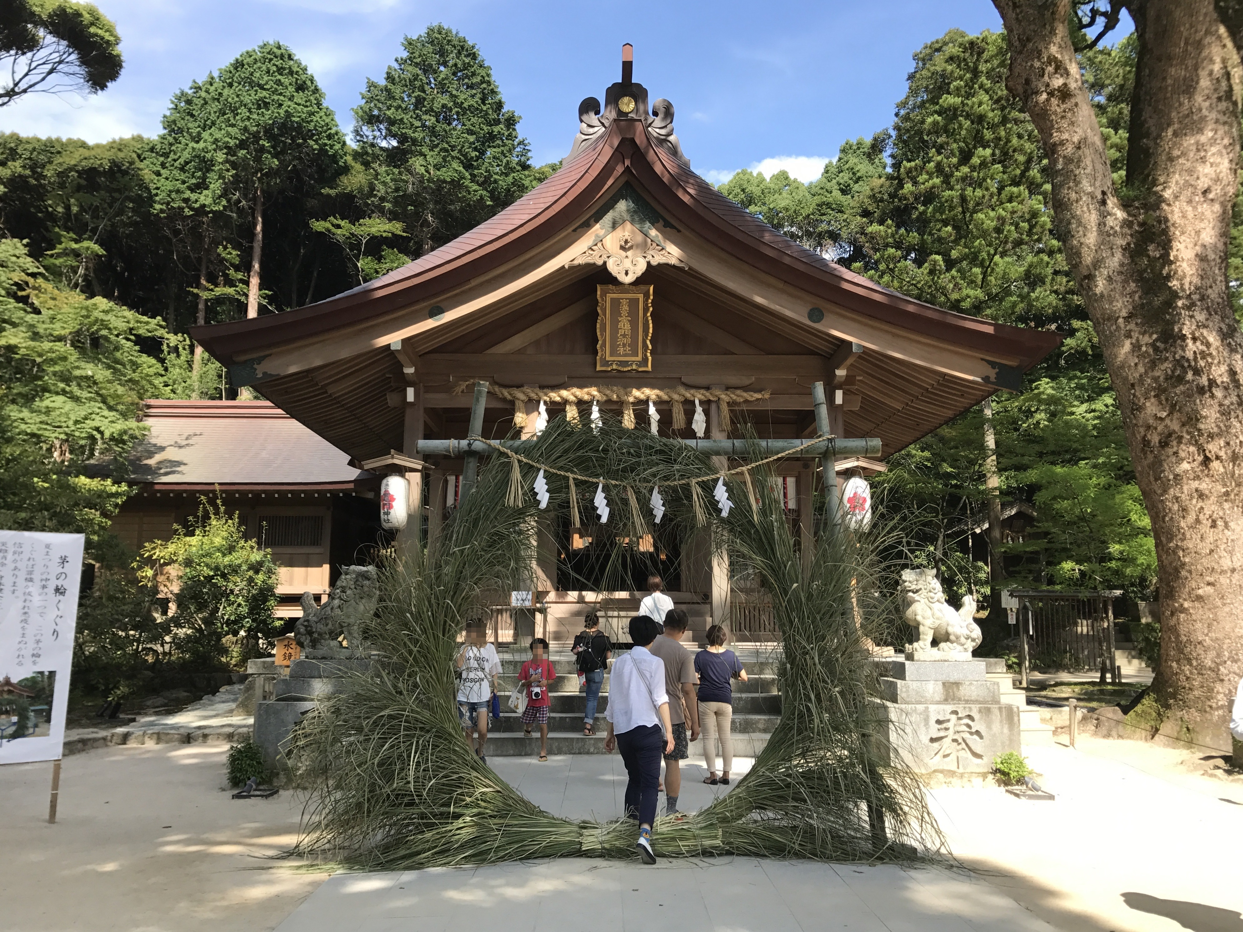 竈門神社の拝殿と茅の輪